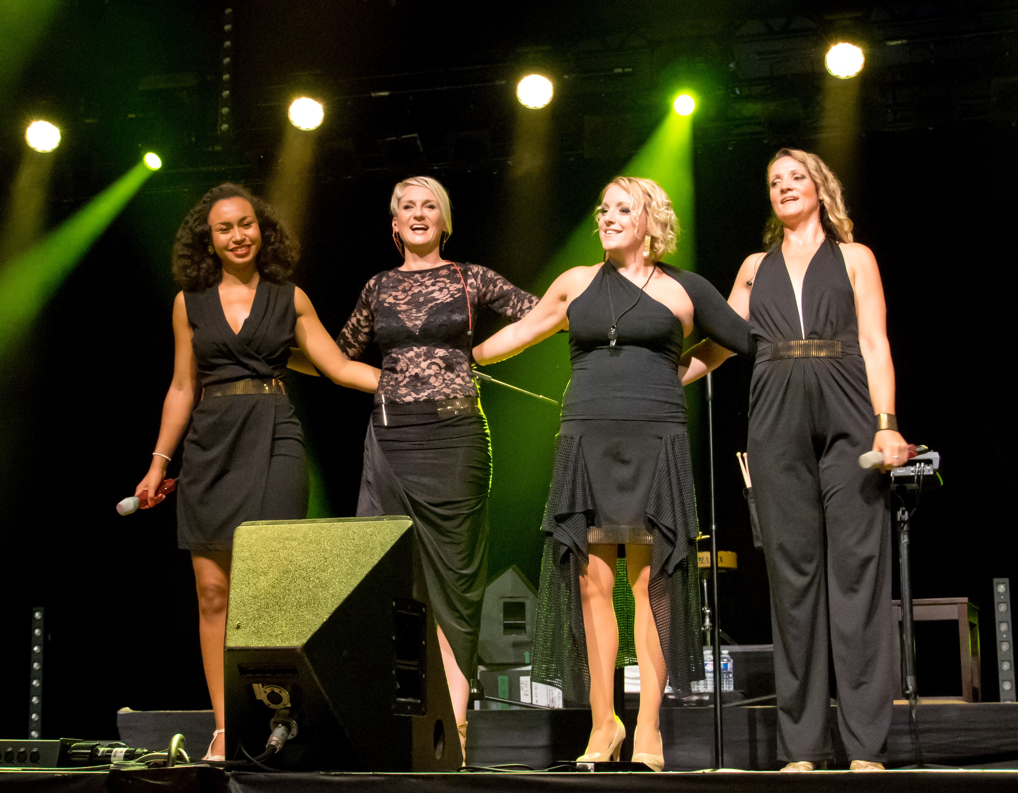 Bilder vom Zelt Musik Festival 2018 in Freiburg im Breisgau Auftritt medlz am 24. Juli 2018 im Zirkuszelt "A capella Nacht"